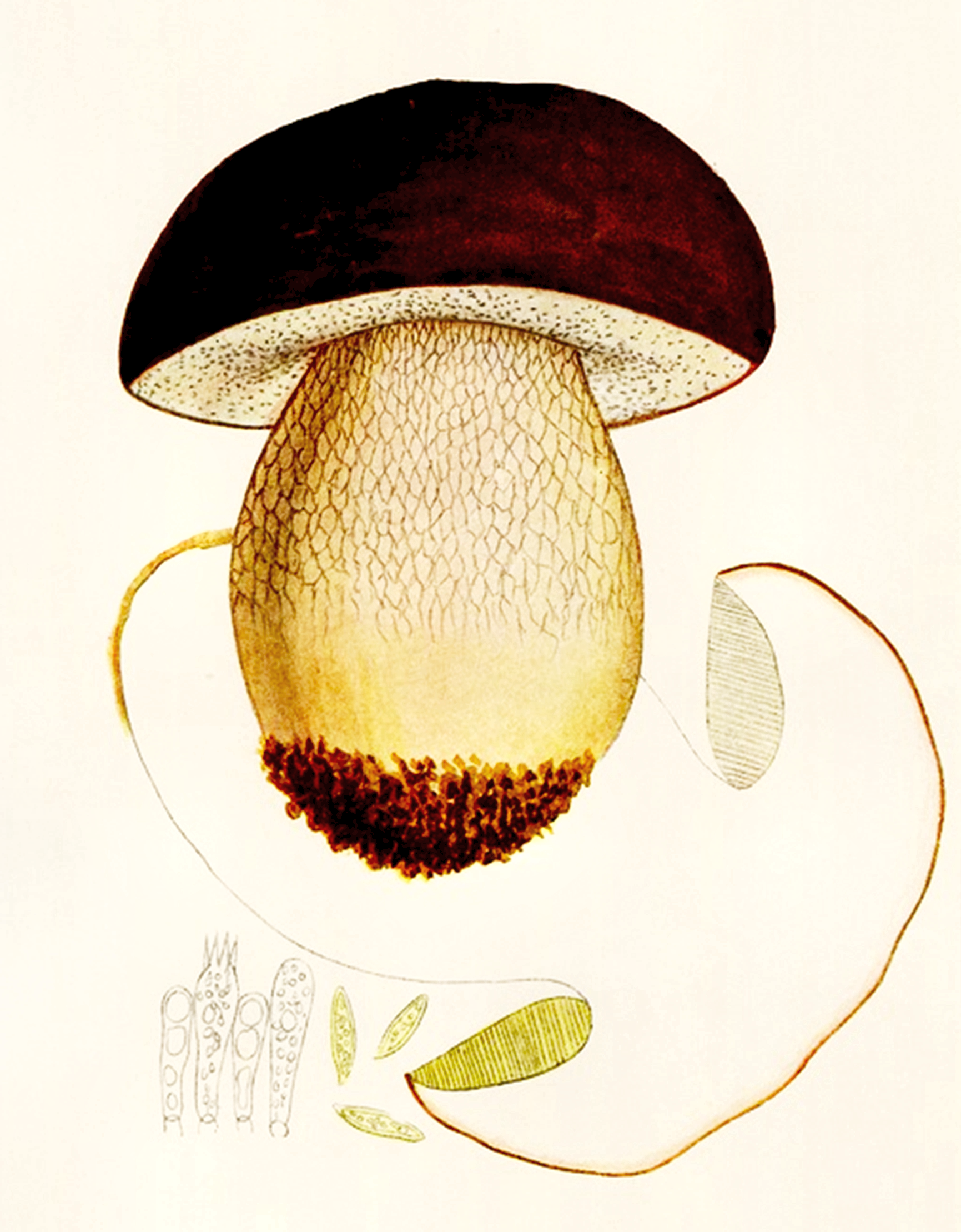 Giacomo Bresadola: Boletus aereus tab 924 (1931): Ist eine von 2 Beschreibungen und mit Sicherheit Boletus pinophilus